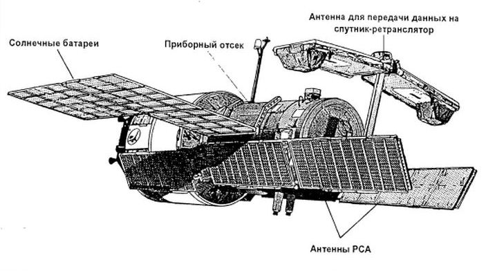 Schéma atellite de reconnaissance radar russe Almaz-T/Resurs-R